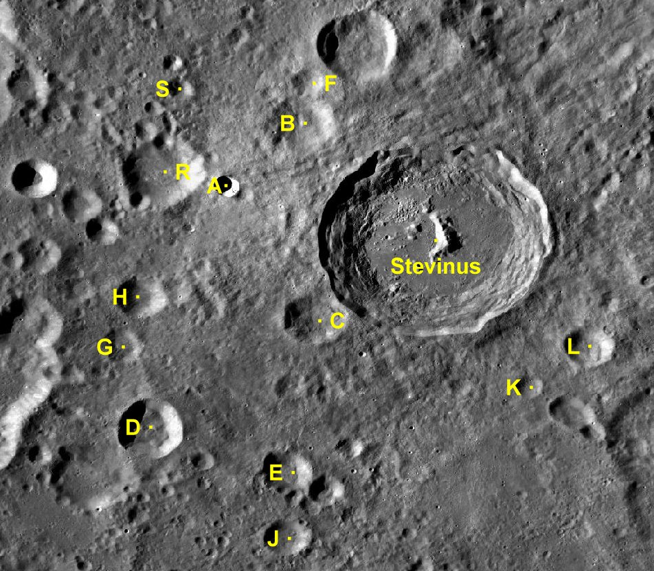 Cráter lunar Stevinus. Cráteres satélite. (Imagen LRO)